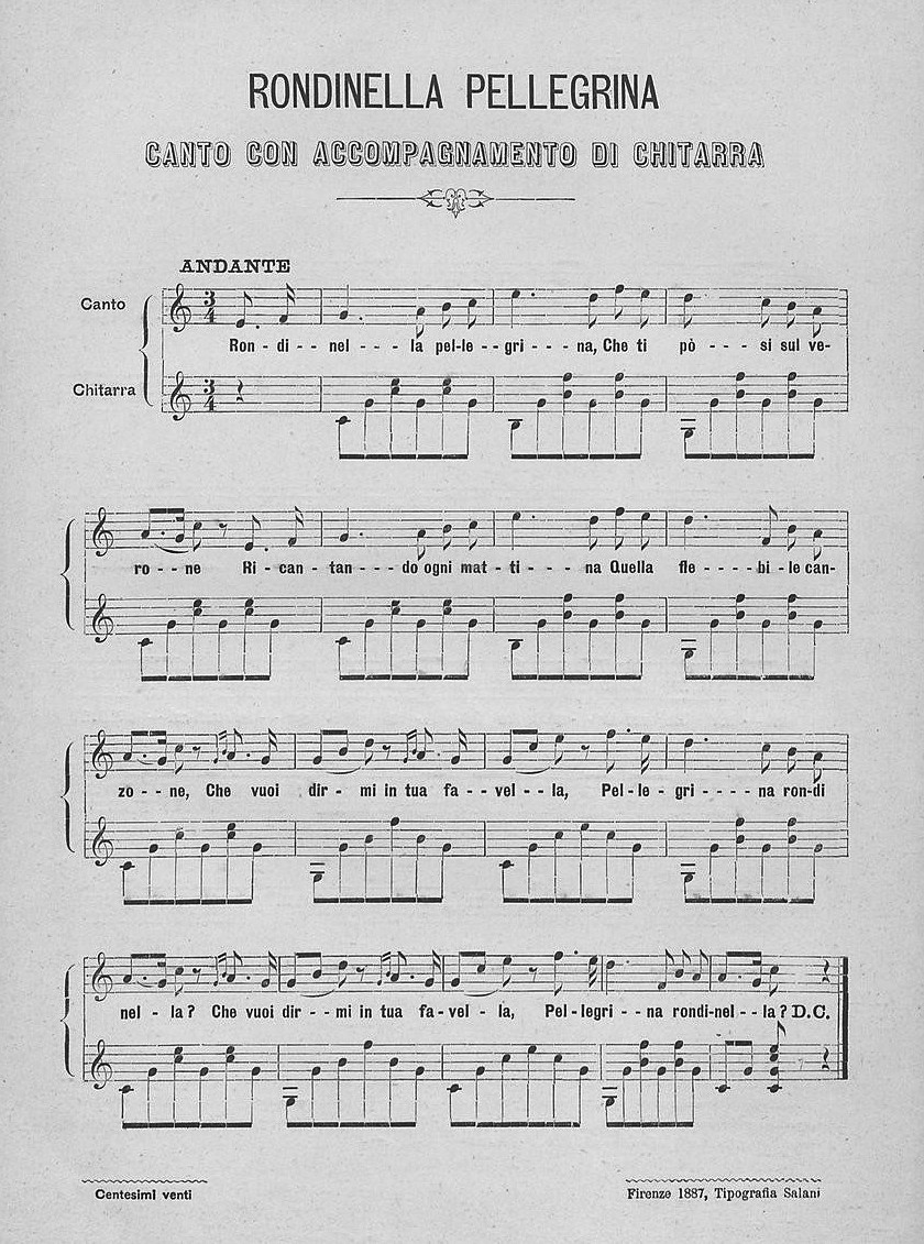 Rondinella pellegrina